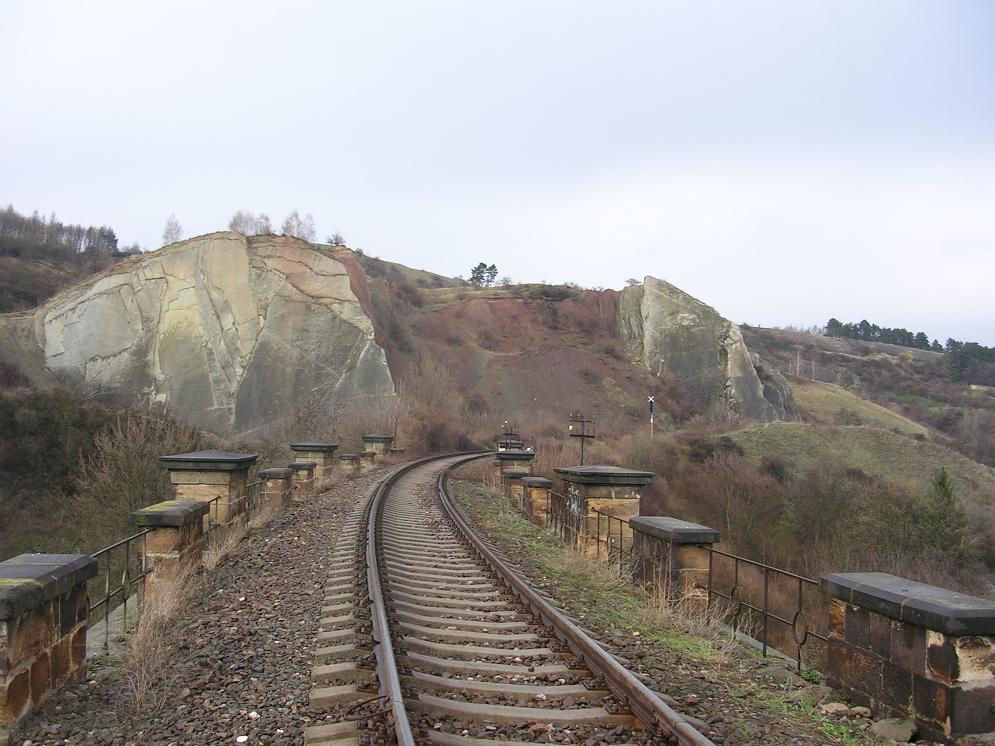 Hlubočepský viadukt na trati č. 122, pohled po trati směrem k zastávce Praha-Žvahov